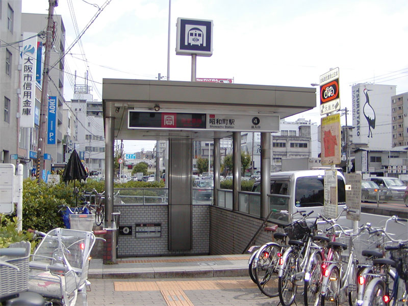 大阪市営地下鉄御堂筋線 昭和町駅 4番出口（大阪市阿倍野区）